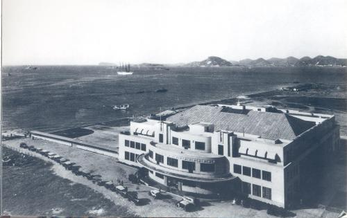 Antiga Estação de Hidroaviões, Aeroporto Santos Dumont, Rio de Janeiro, RJ.